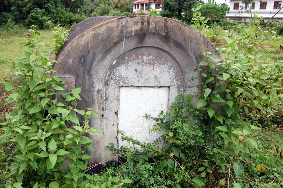 ജൂതക്കല്ലറ-മാള